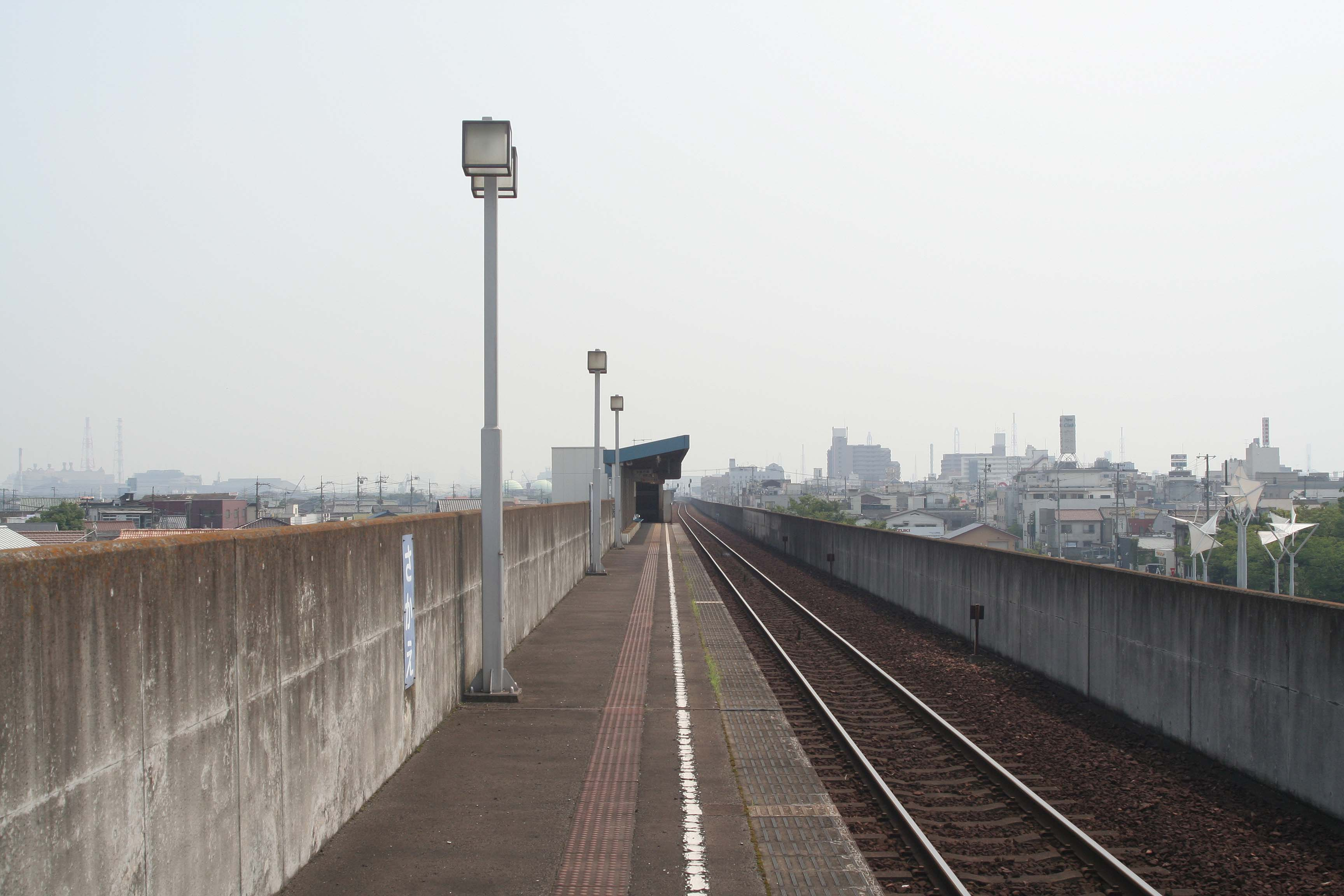 栄駅の構内